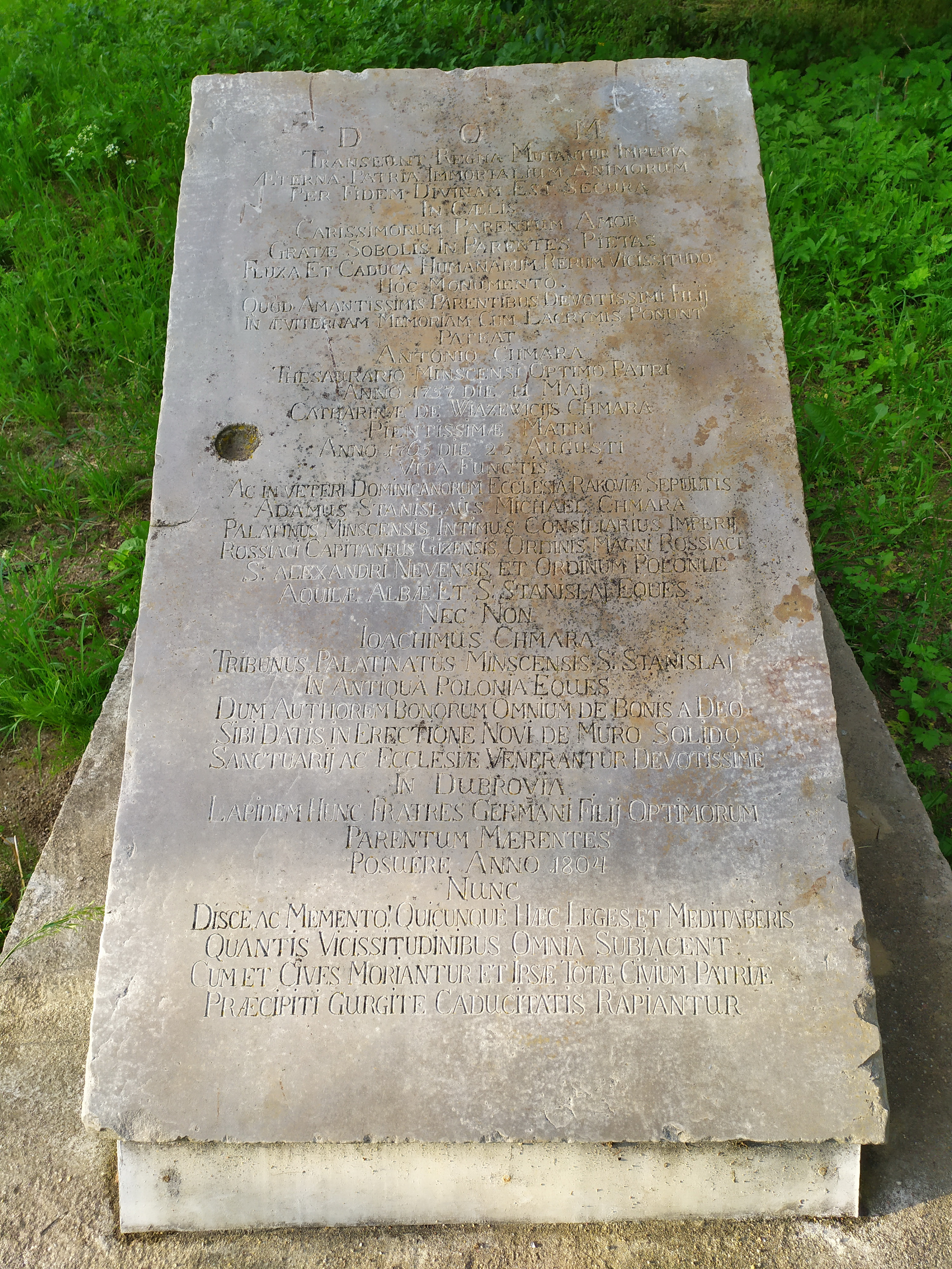 Сёмкава, сядзіба Хмараў.